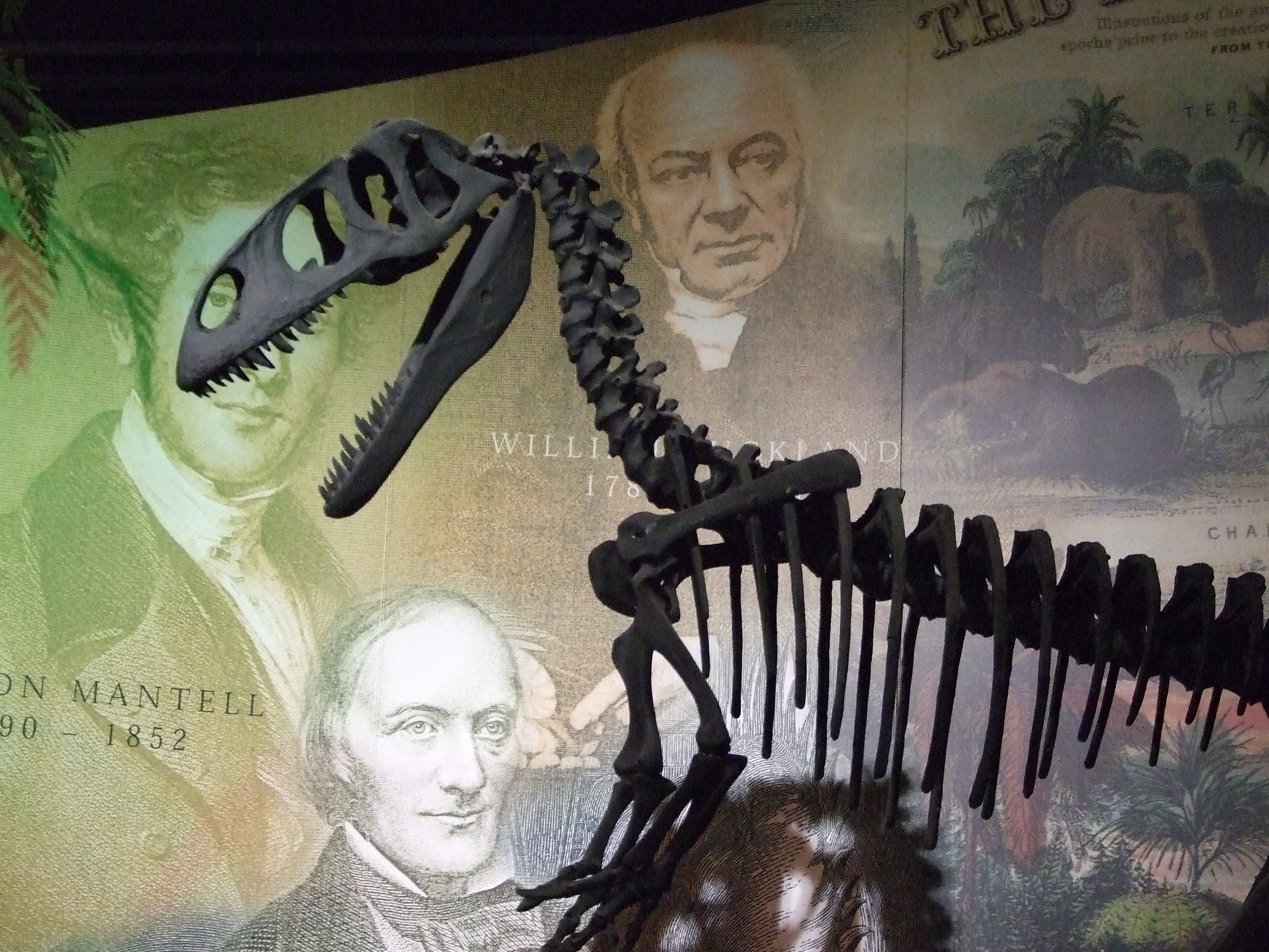 Dinosaur heroes